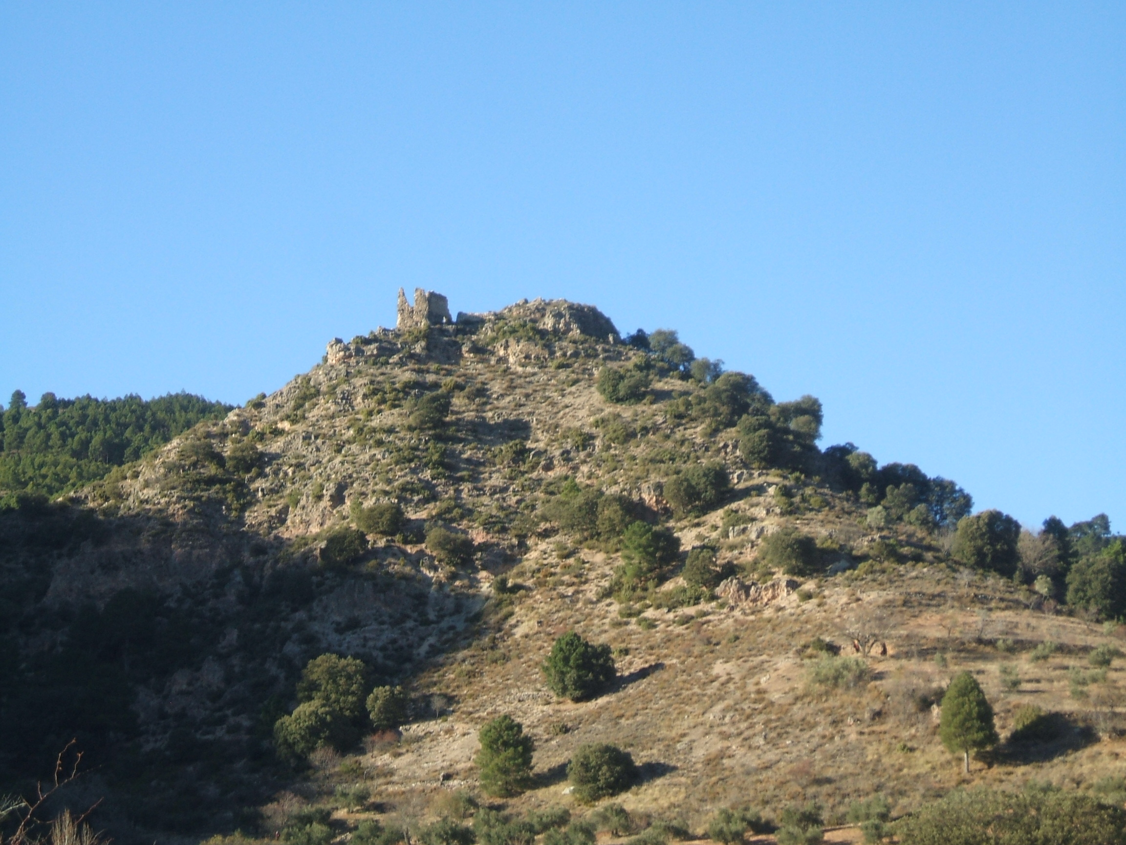 Fotografía del Castillo de San Vicente de La Vegallera (Molinicos, provincia de Albacete) sobre un promontorio del terreno.